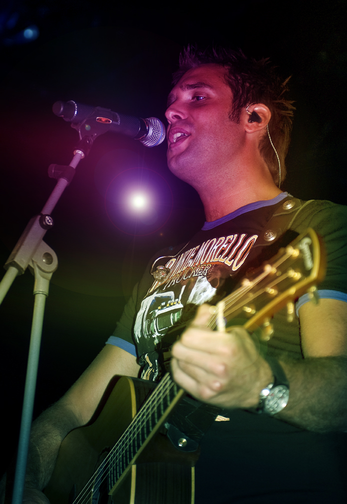 Optreden Nick en Simon in Wernhout